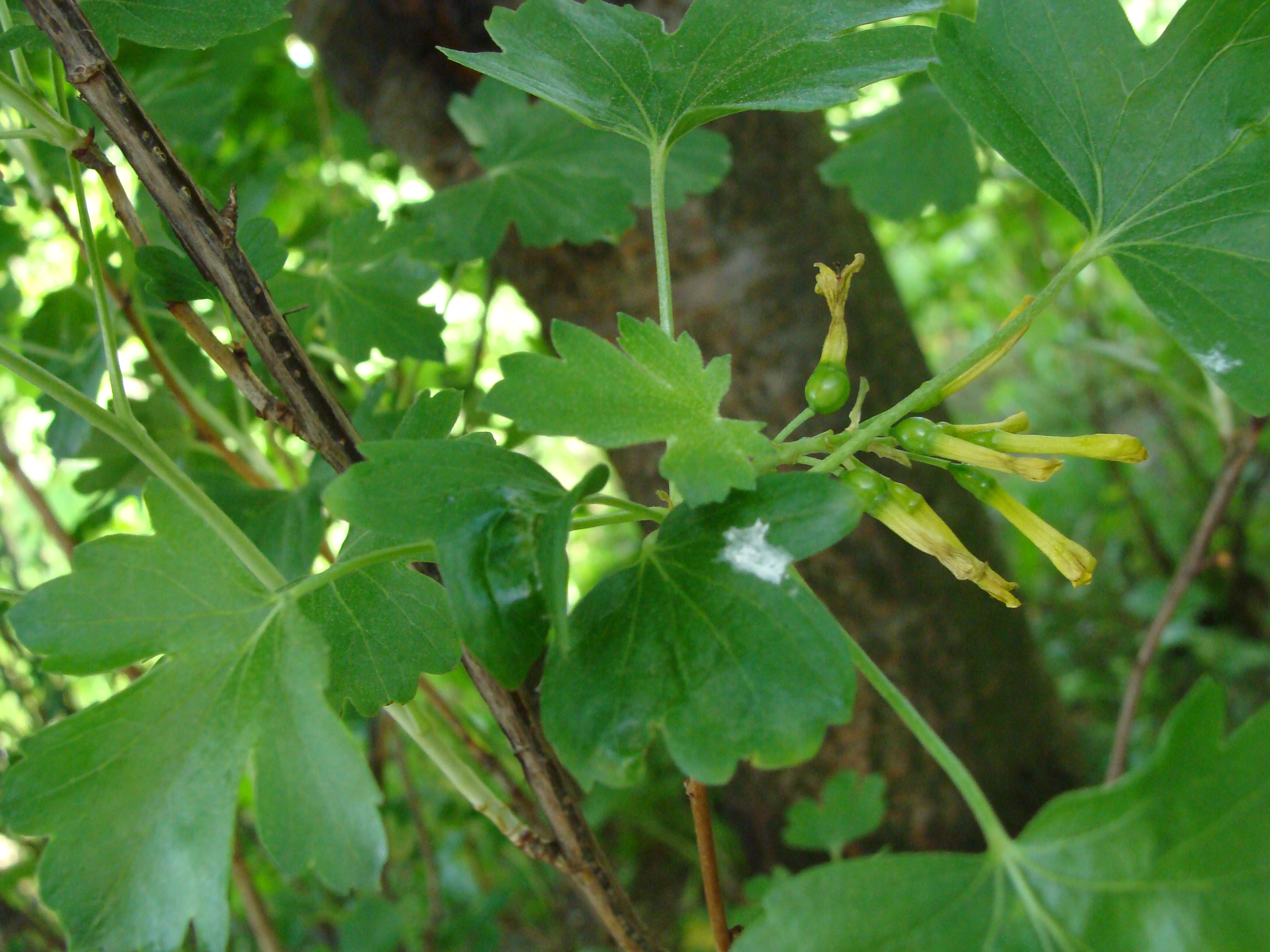 Ribes aureum Porzeczka złota